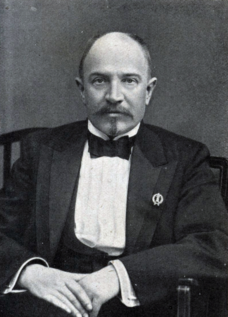 Малянтович, Павел Николаевич